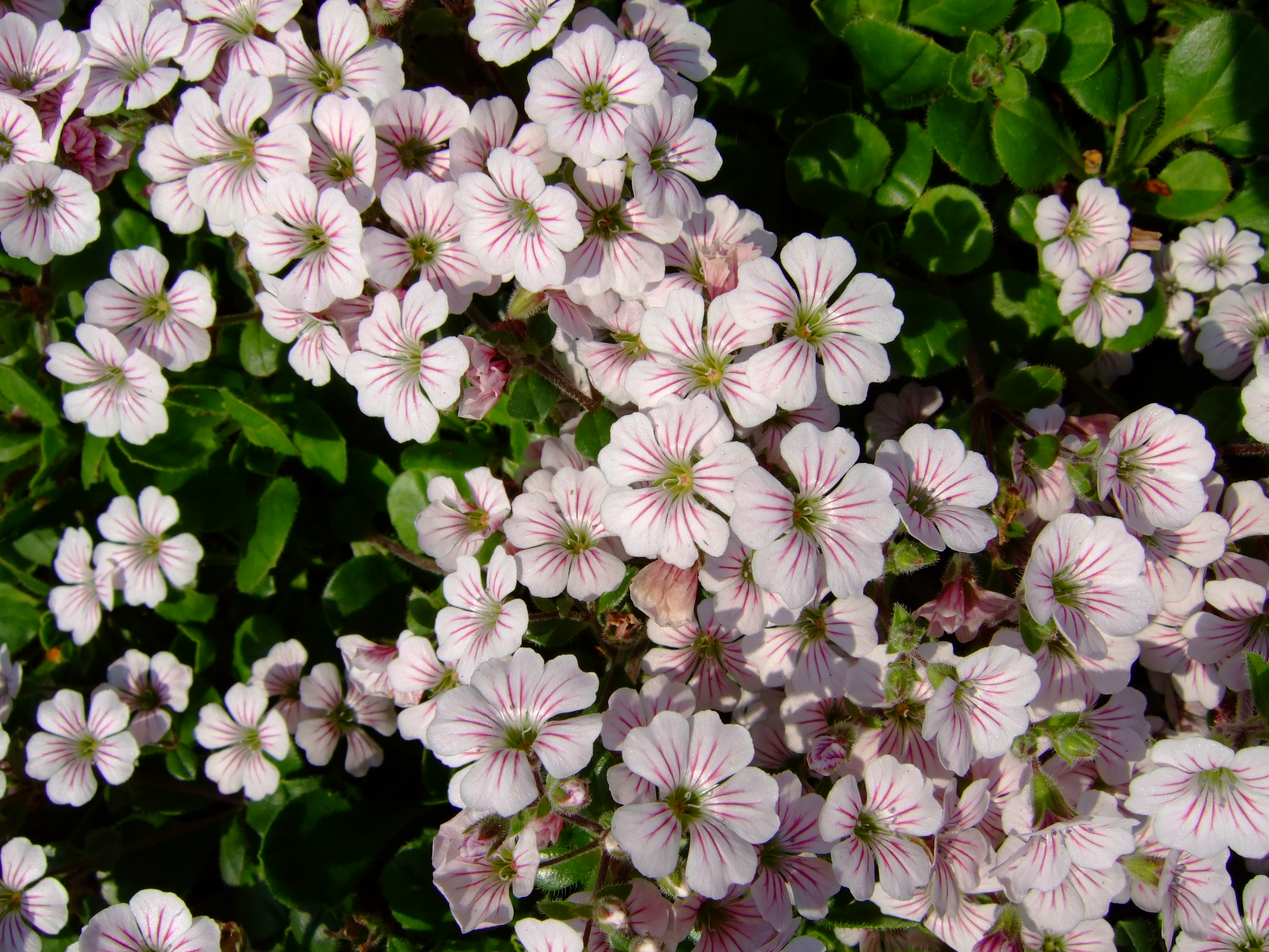 兵庫県立フラワーセンター